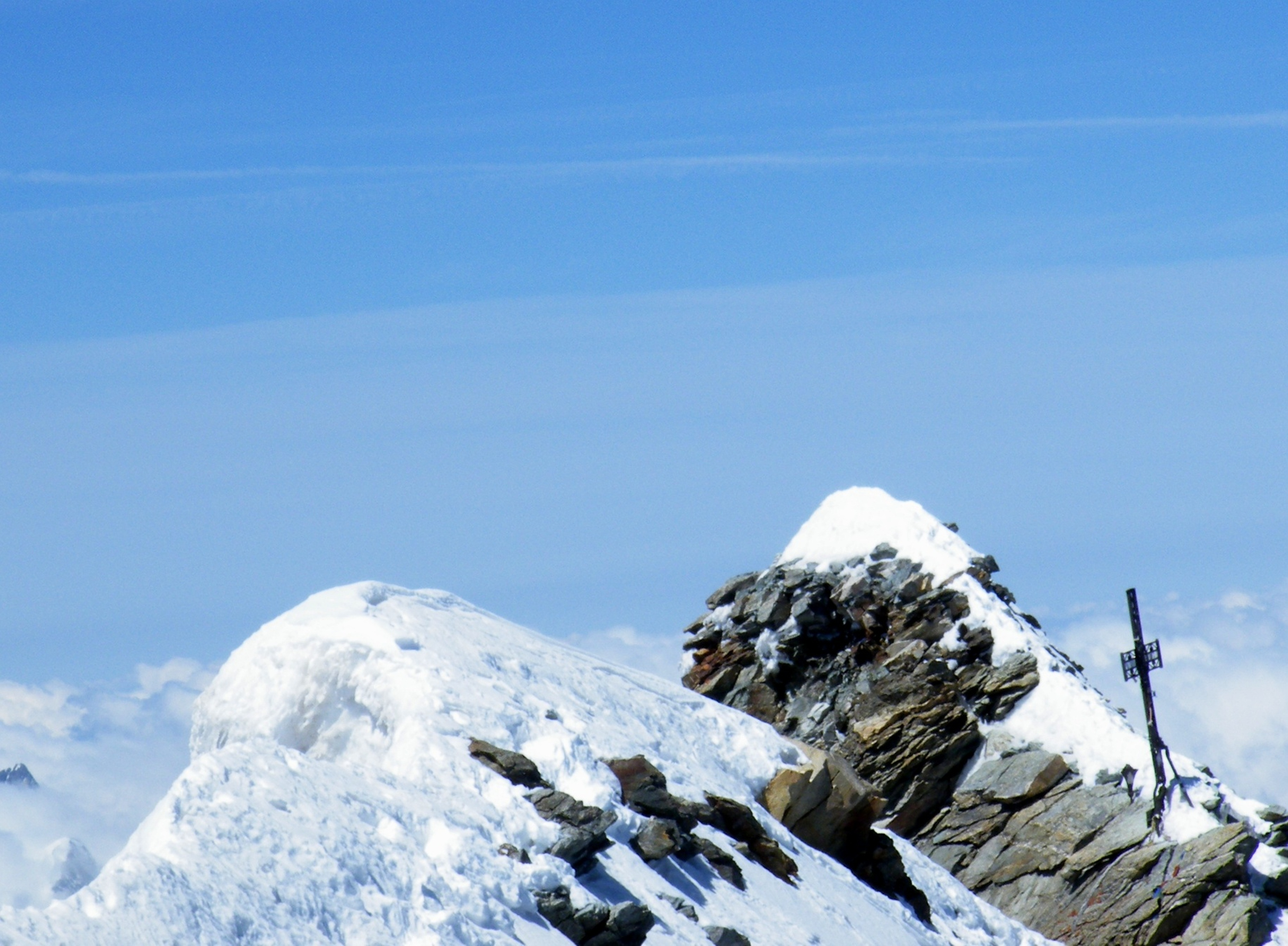 Roy Lindman